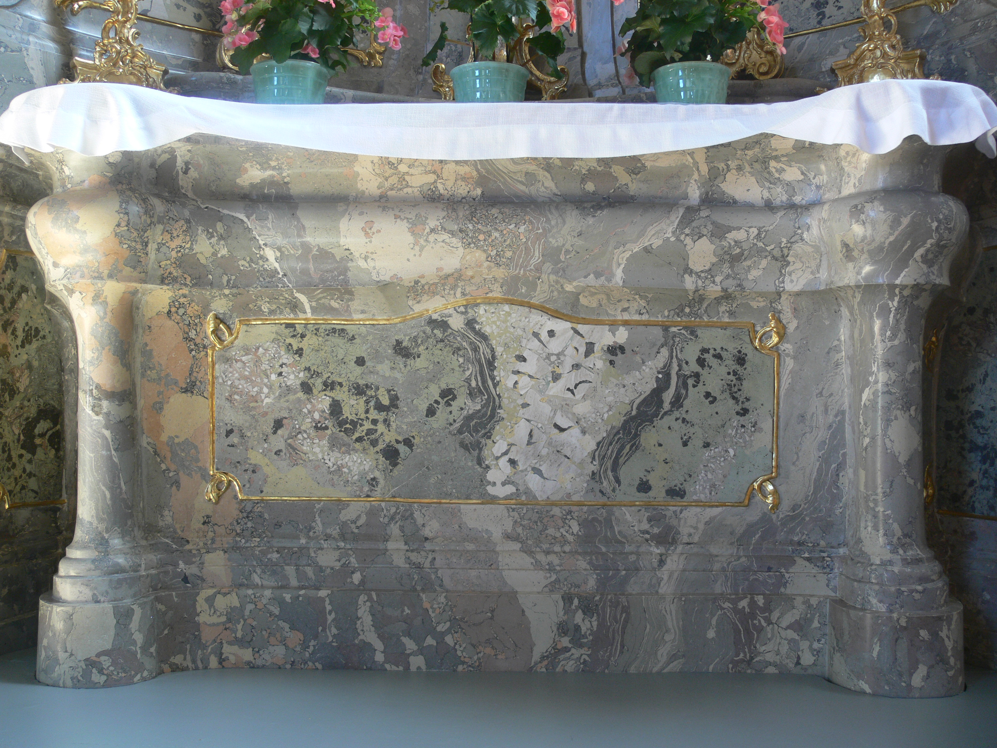 Pfarrkirche St. Pankratius, Wiggensbach; Nepomukalatar, marmorierter Altarblock